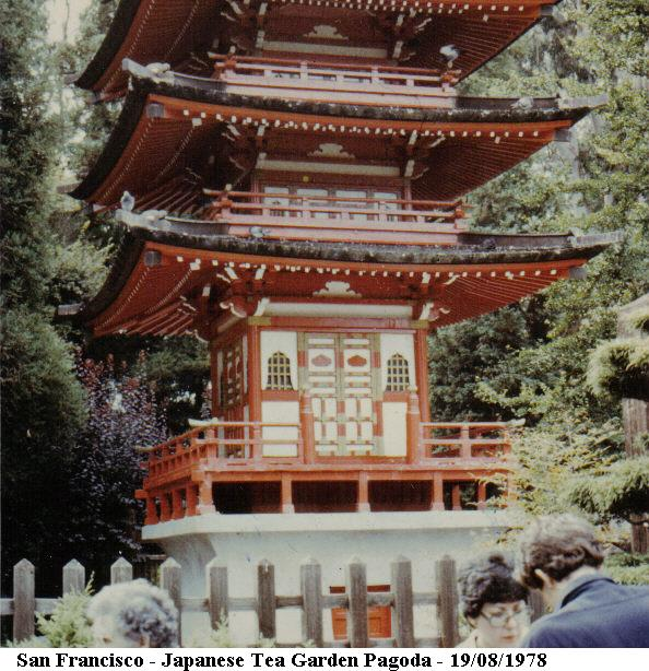 San Francisco - California - Japanese Tea Garden Pagoda - 1978